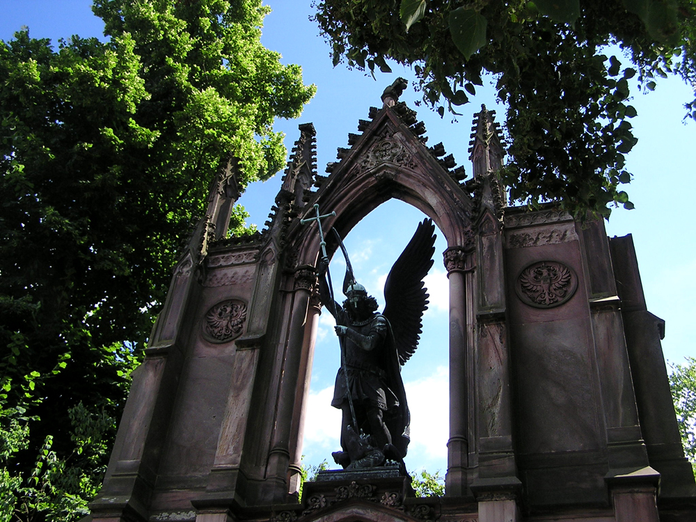 Standbild des Erzengels Michael im Kampf mit dem Drachen